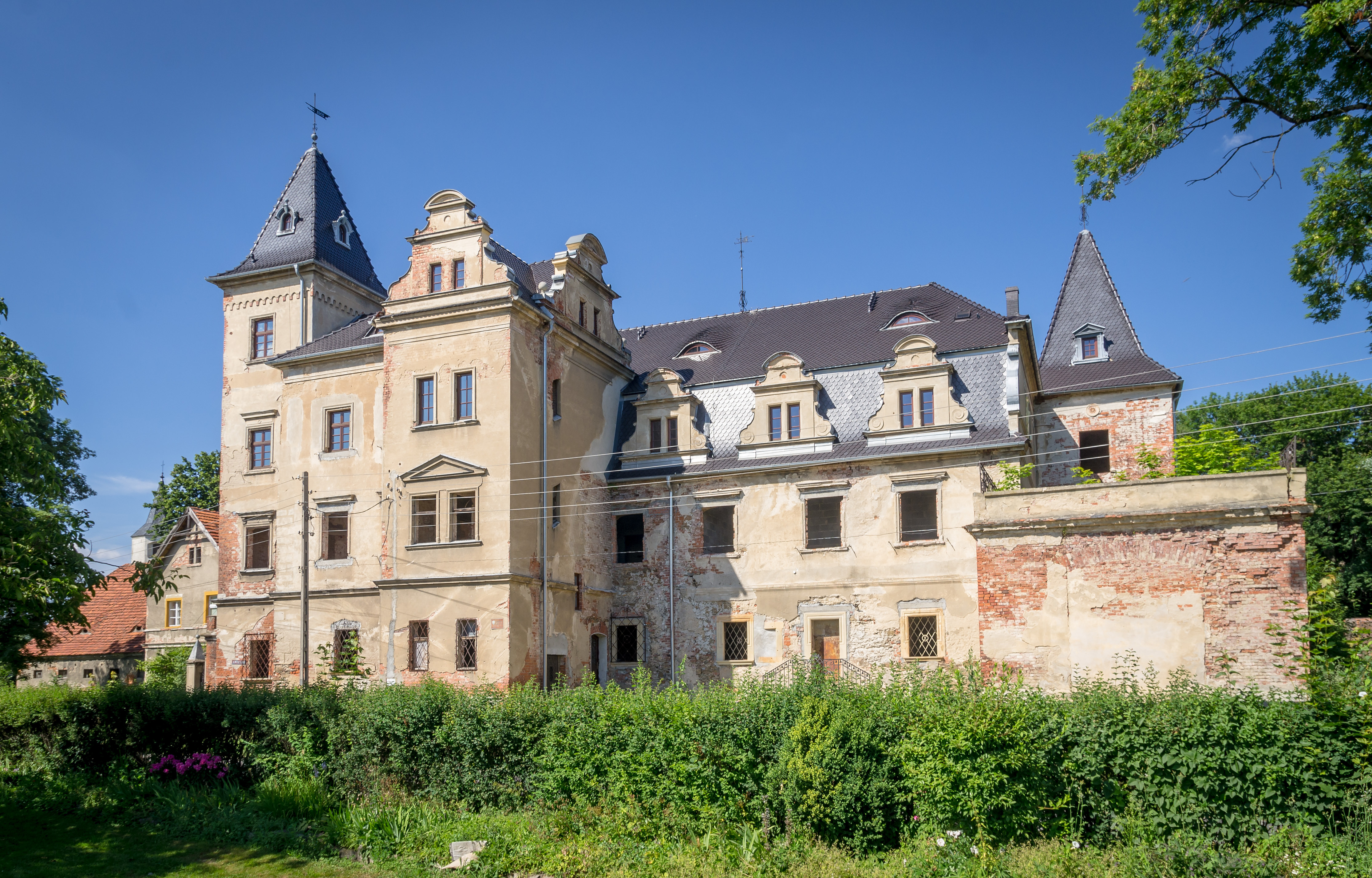 Nowizna - pałac, XVI, XIX You can see all photographs in category Wikiekspedycja 2013.